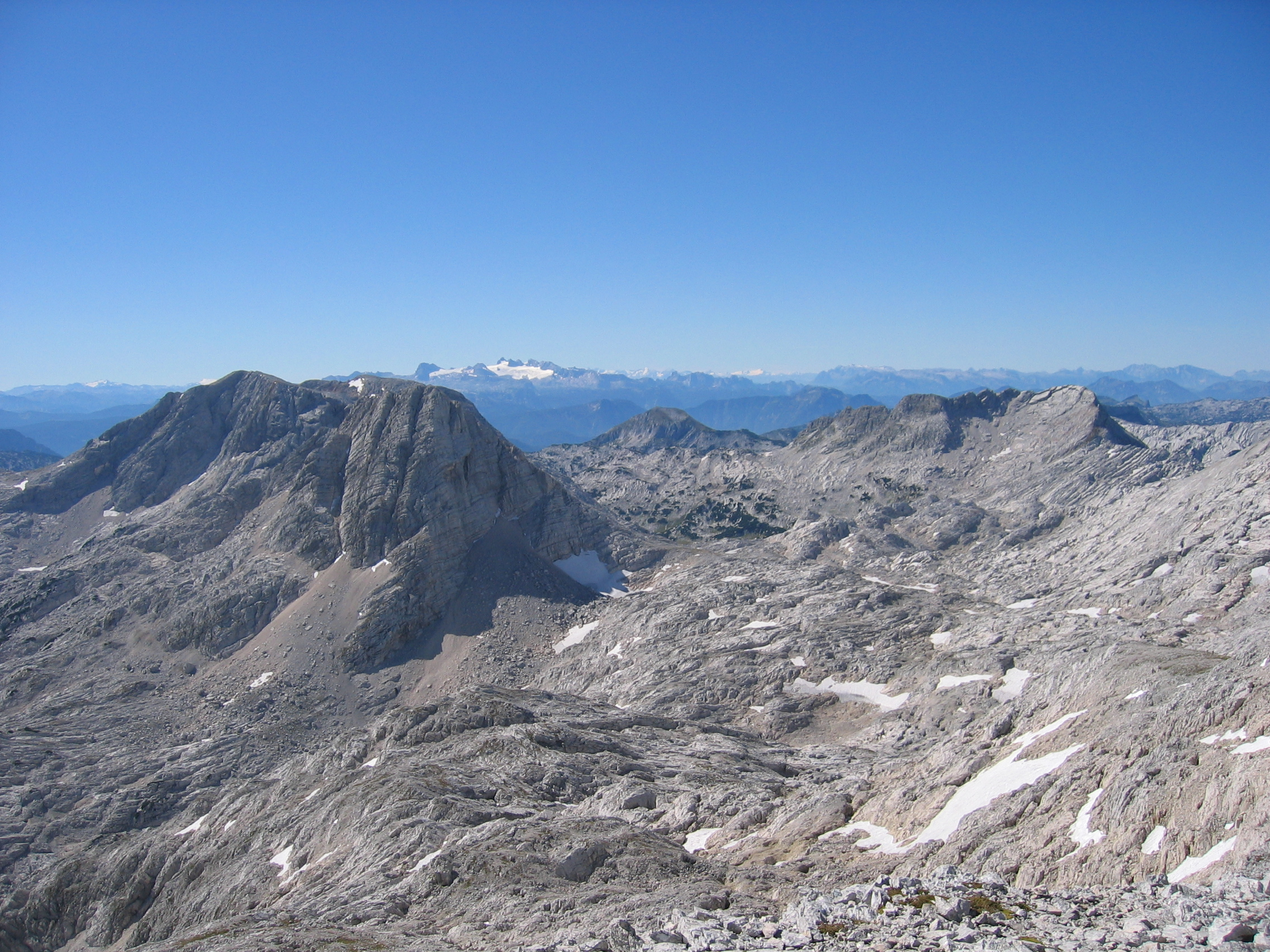 Blick vom Großen Priel auf Temlberg und Rotgschirr, Totes Gebirge, Österreich